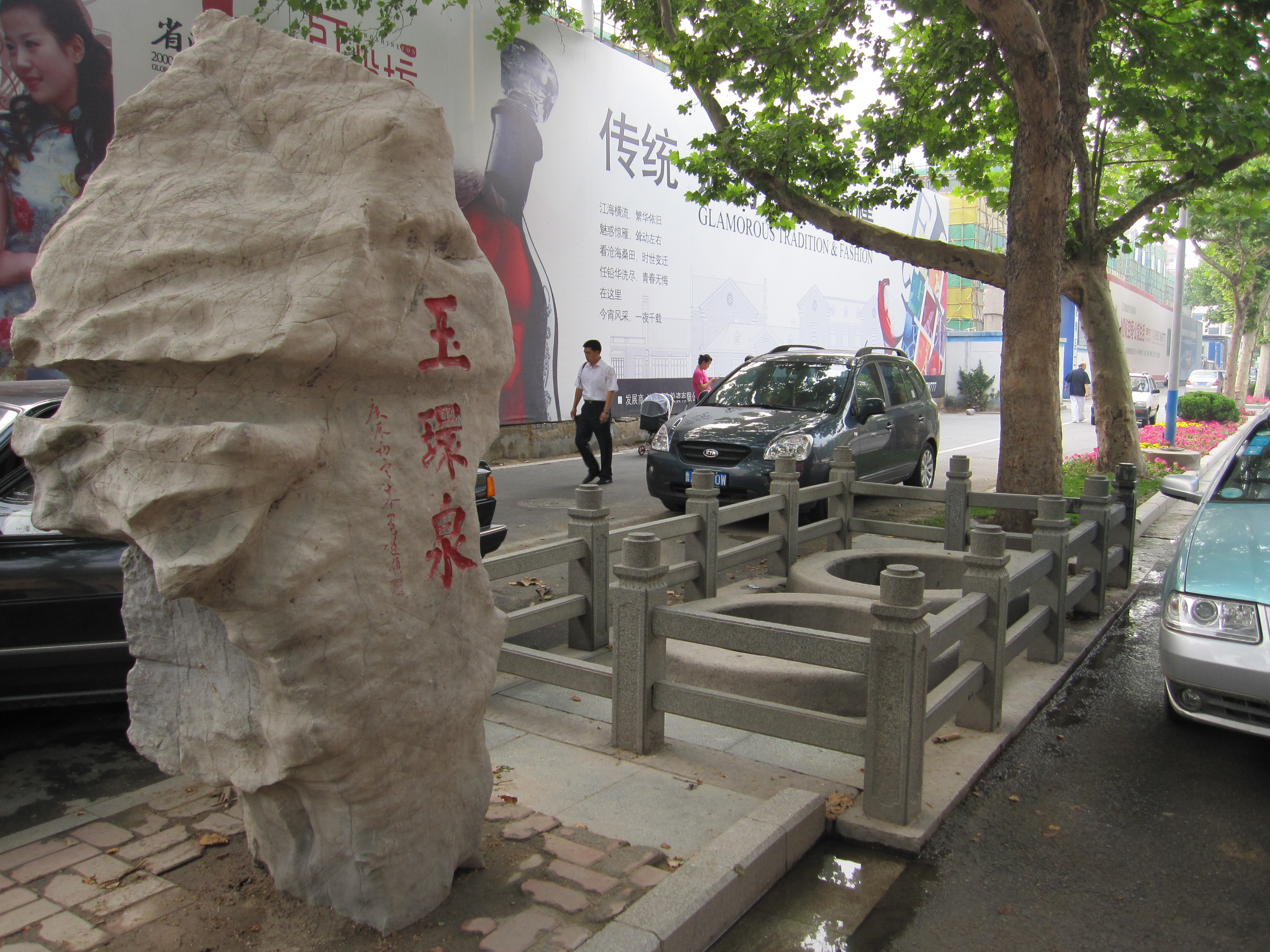 位于济南省府前街的玉环泉，七十二名泉之一，隶属珍珠泉泉群。